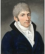 Johann Jacob de Lose (1755-1813), Christian August Joachim Leißring, Frankfurter Schauspieler (1777-?)